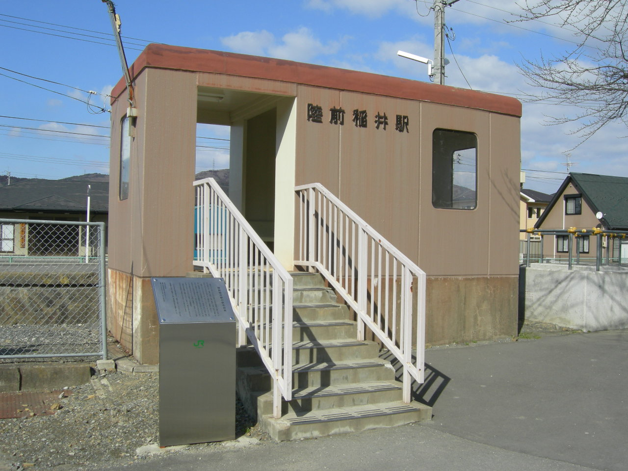 JR石巻線（JR Ishinomaki line）陸前稲井駅（Rikuzen-inai station）駅舎